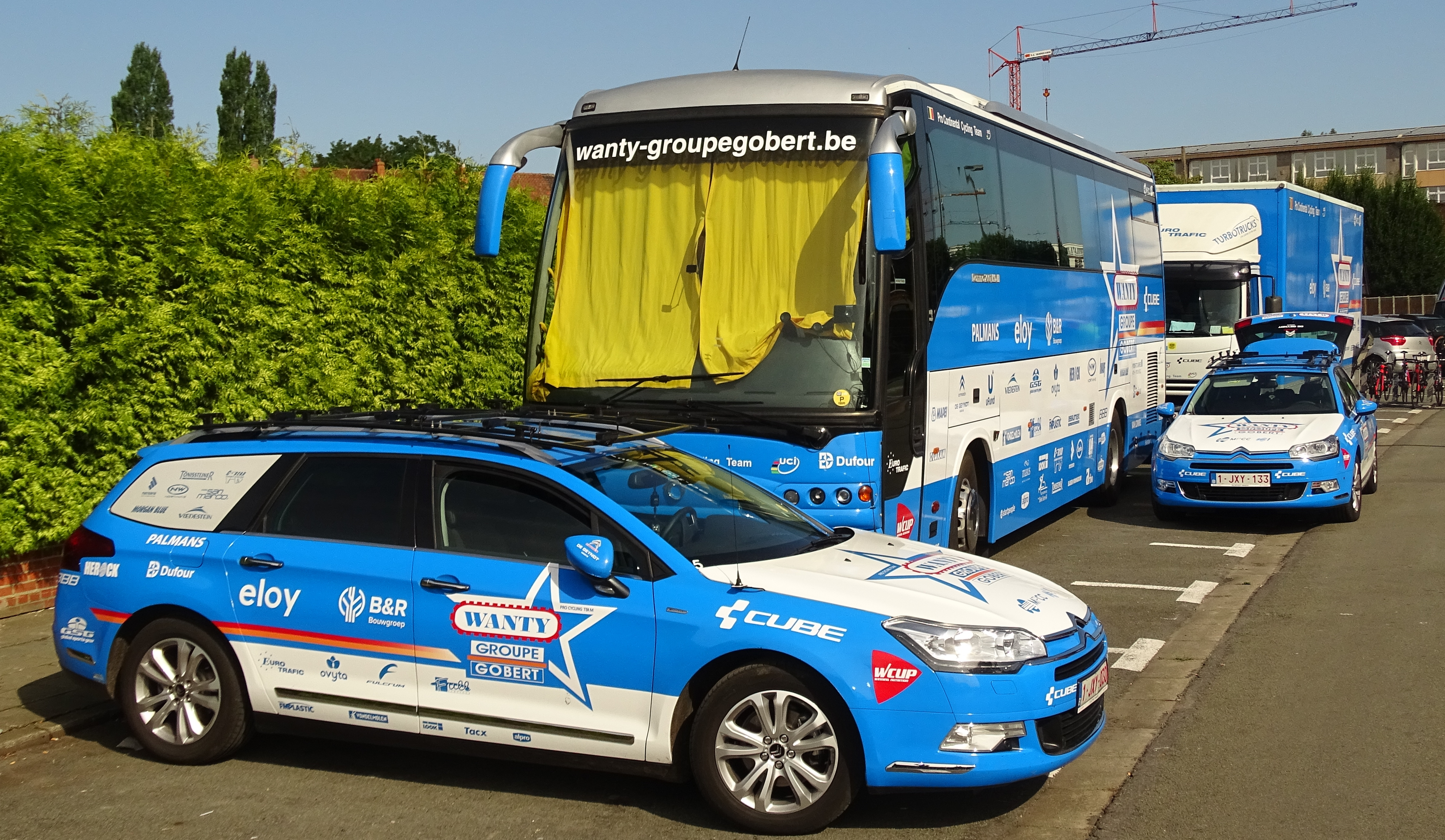 Reportage réalisé le mercredi 22 juillet à l'occasion du départ du Grand Prix Pino Cerami 2015 à Saint-Ghislain, Belgique.